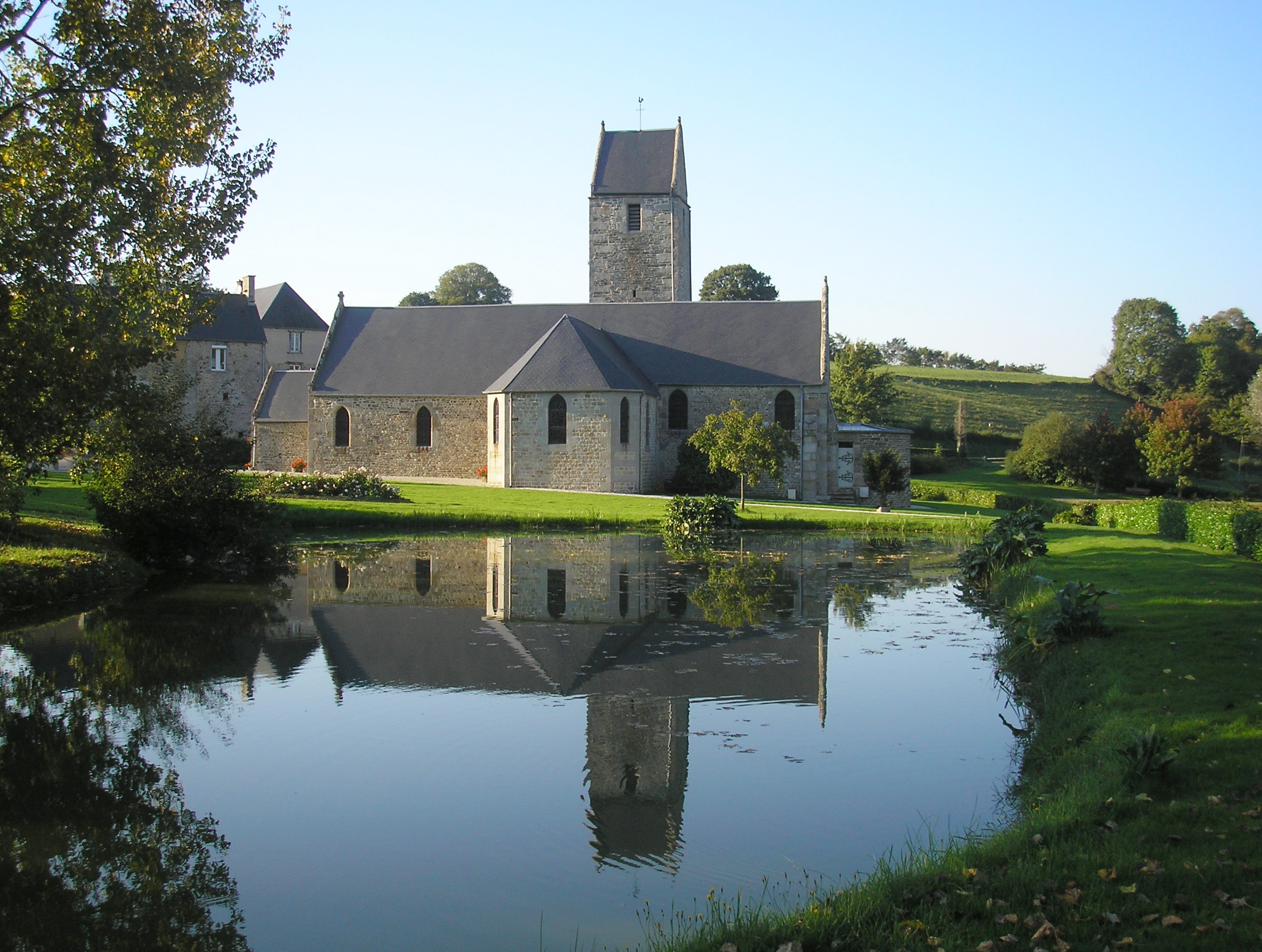 Gouvets (Normandie, France). L'église Sainte-Marthe.